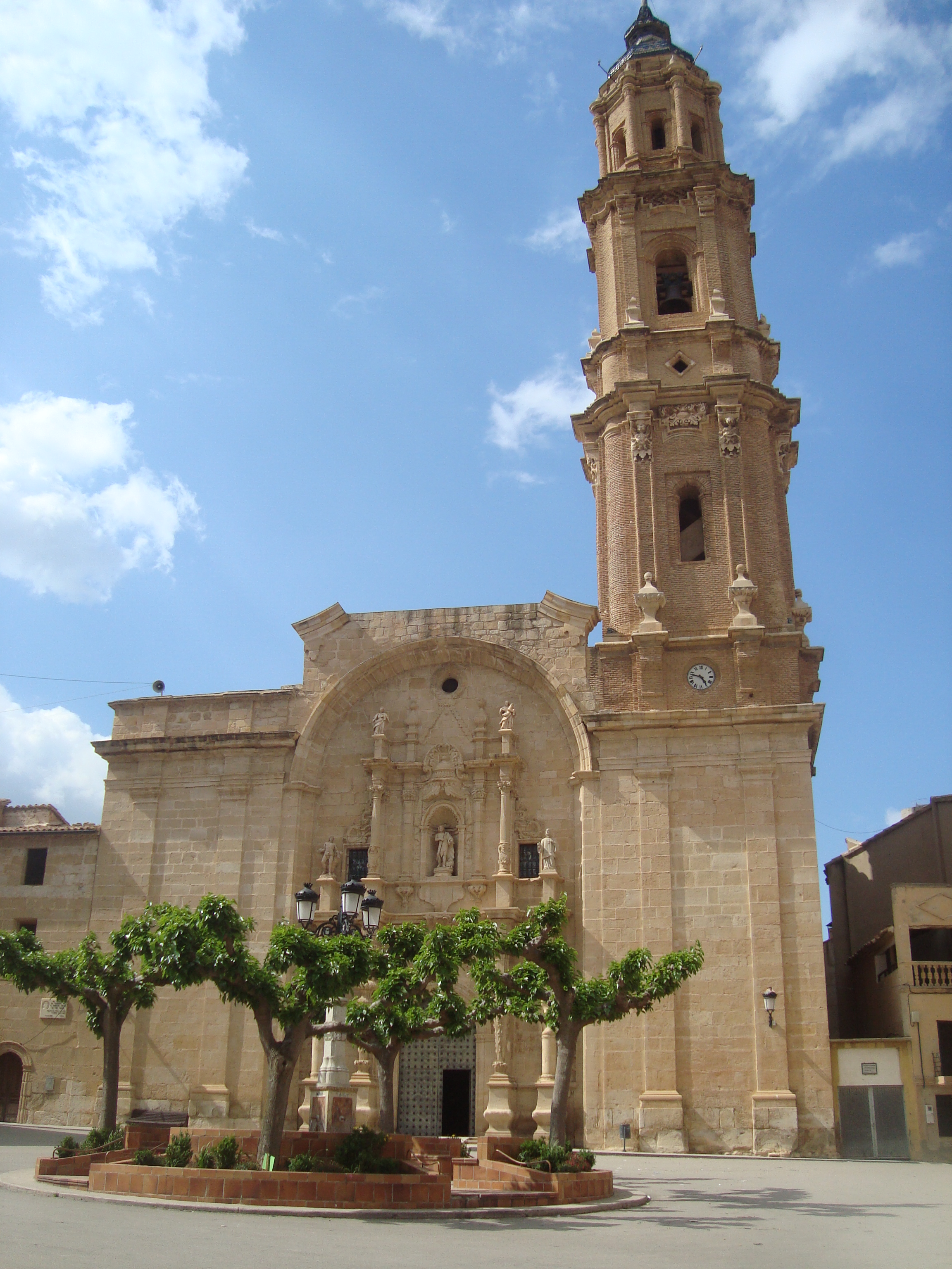 Iglesia de San Juan Bautista (Mas de las Matas,Teruel, España)